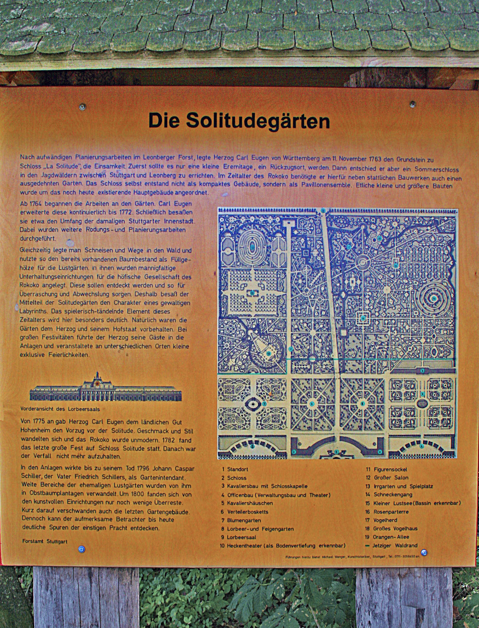 Übersichtsplan des Schlosses und der nicht mehr vorhandenen Gärten Solitude, Stuttgart